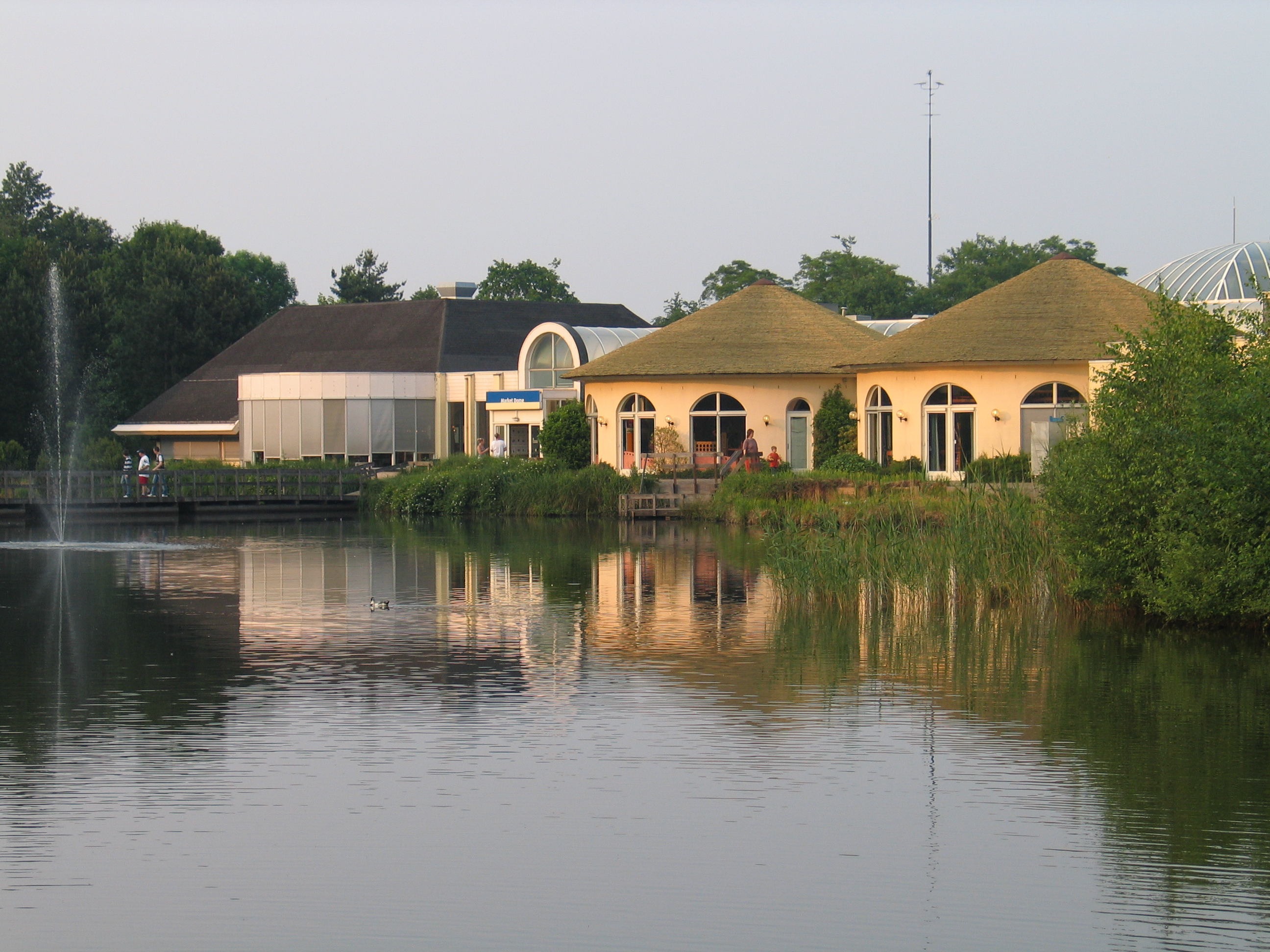 Zijaanzicht Market Dome Loohorst